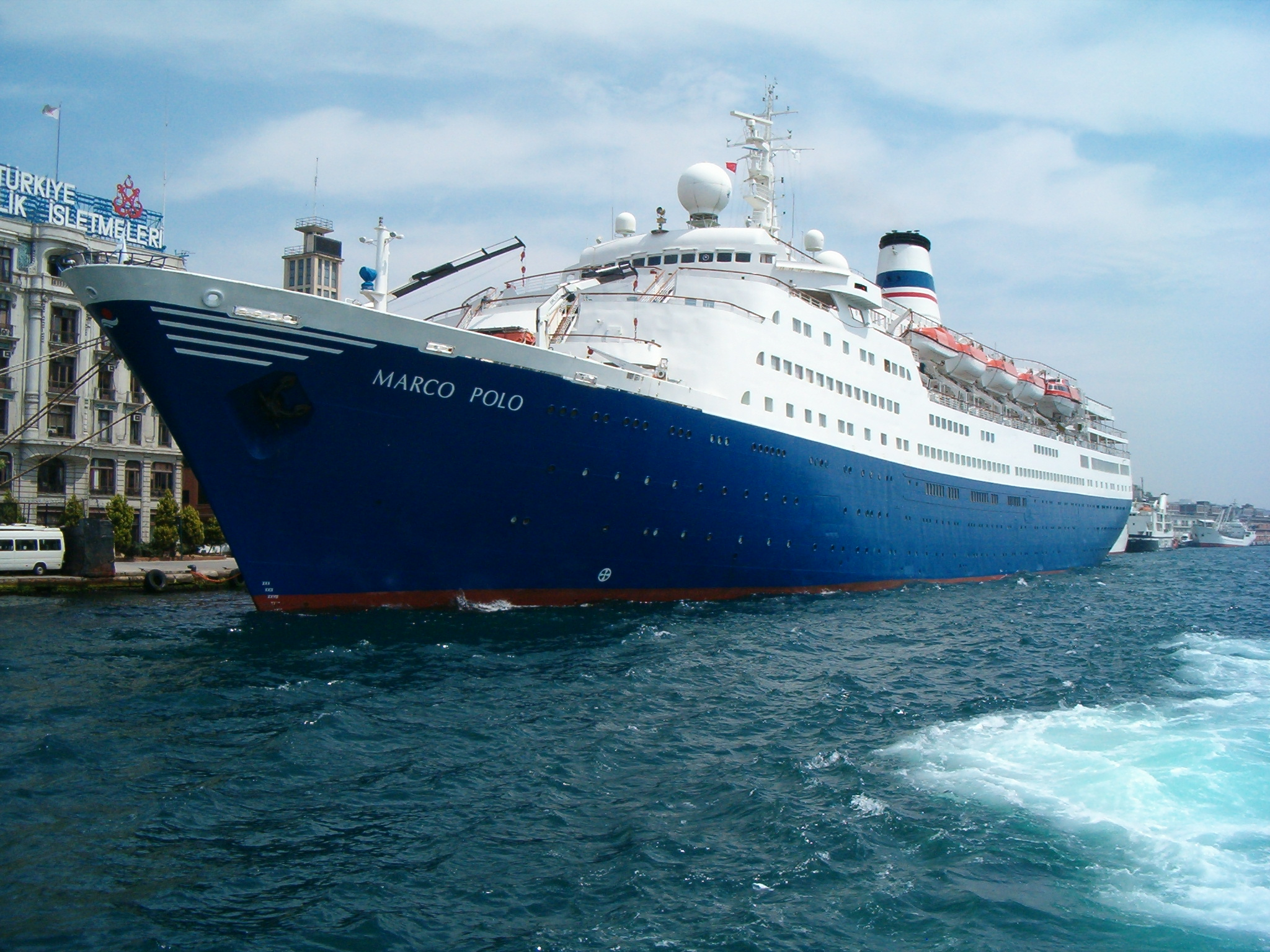 MS Marco Polo in Istanbul